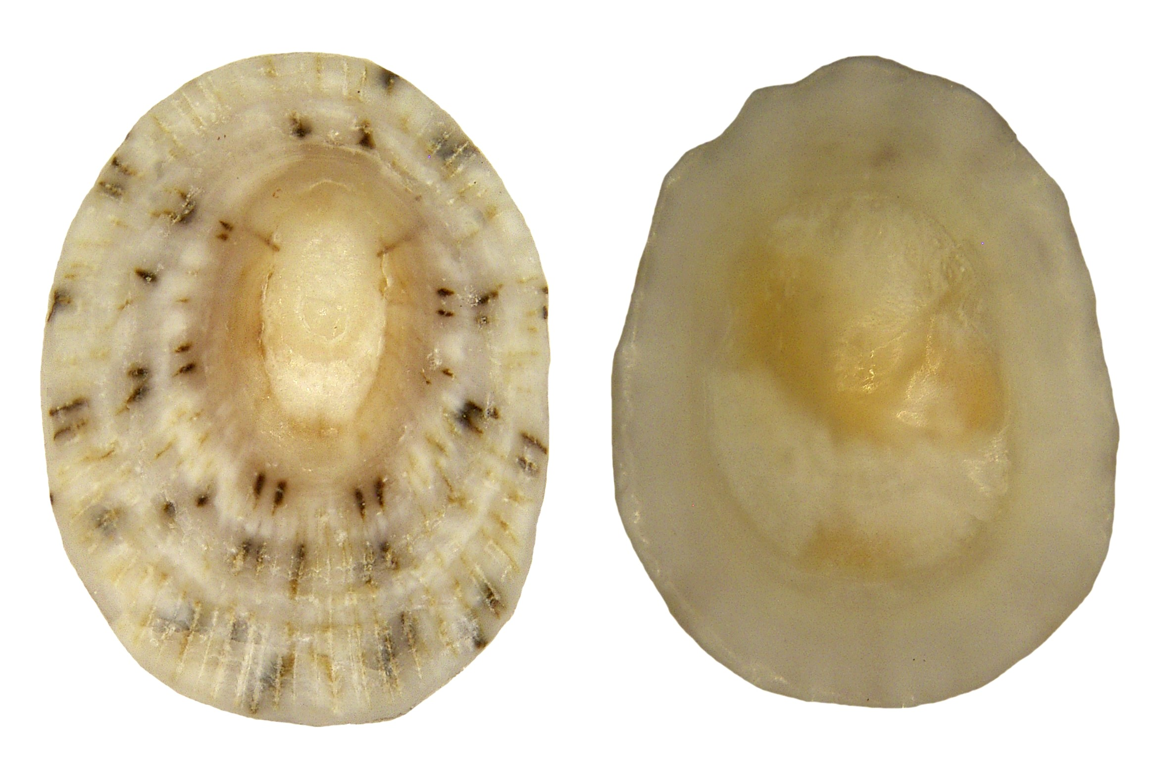 Familie: Acmaeidae Groesse: 25 mm Verbreitung: Westindien Fundort: Dominikanische Republik, Luperon leg.det. U.Schmidt, 1989 Photo: U.Schmidt, 2008